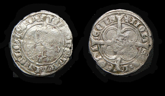 Demi-griffon liégeois de Jean de baviere. Emission de l'atelier de Liège de 1389.